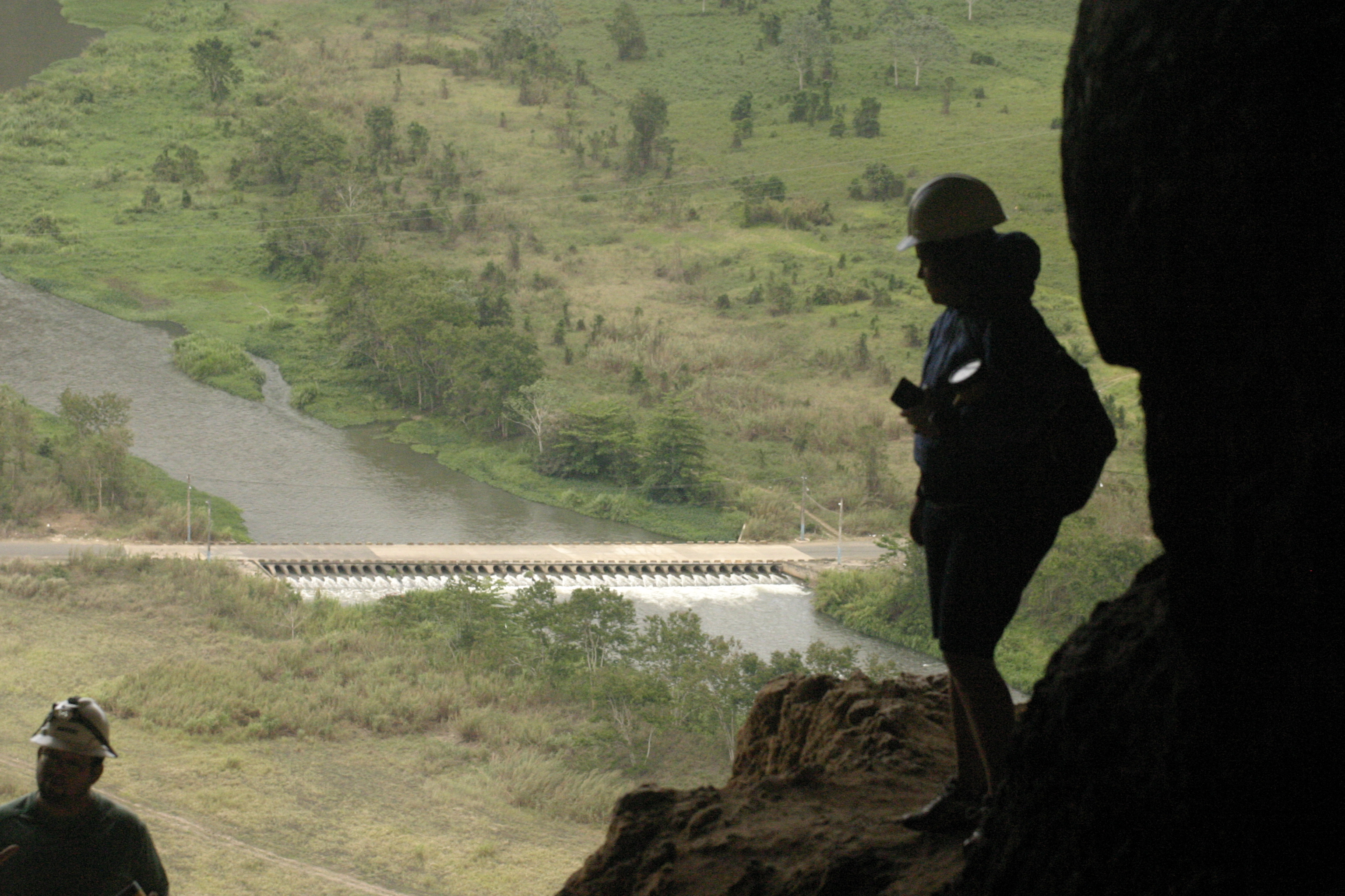 Río Grande de Arecibo desde Cueva Ventana, Puerto Rico